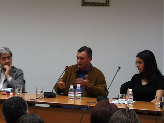 Charla de Arturo Pérez-Reverte en el Salón de Grados de la facultad.